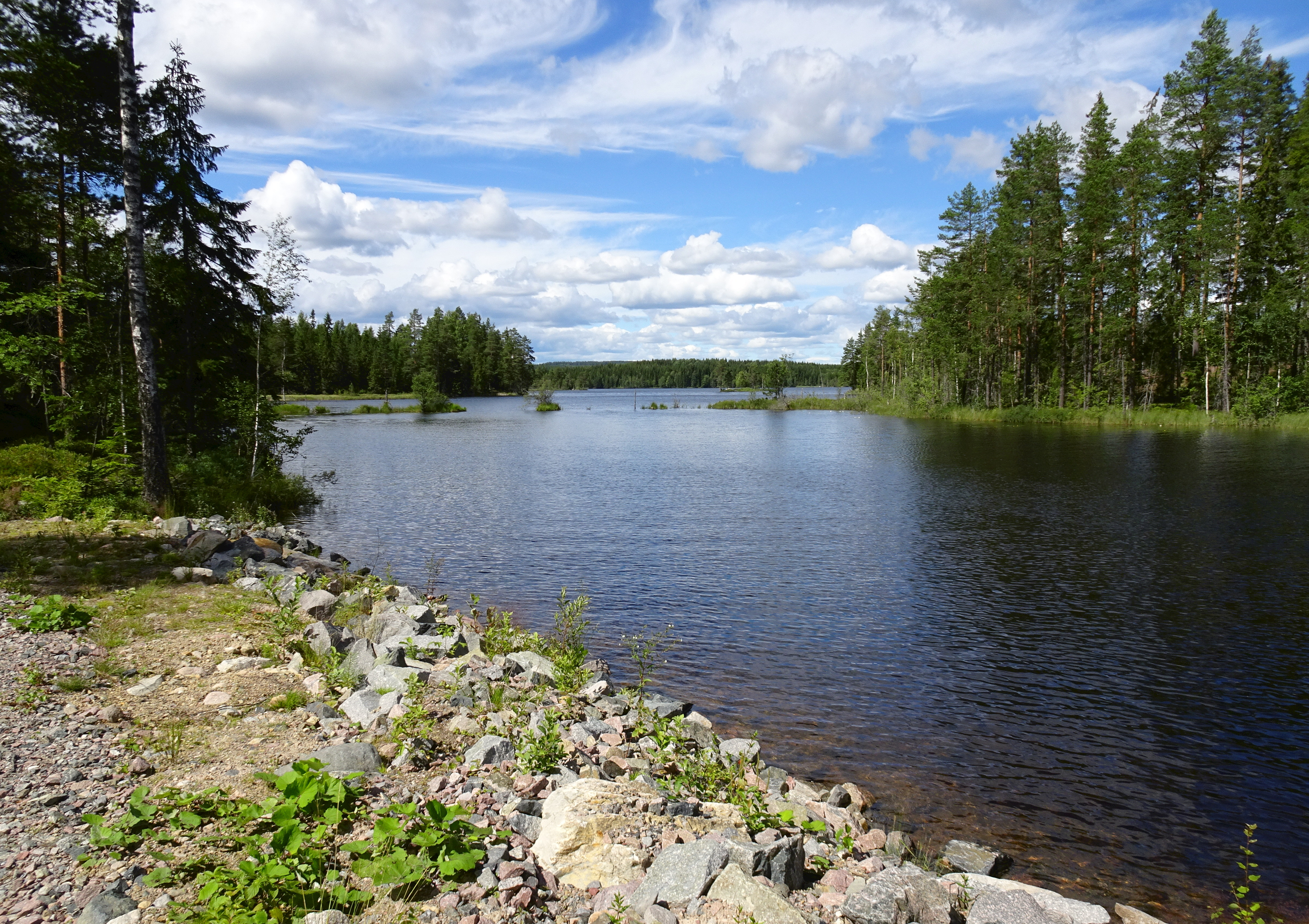 Tunsan